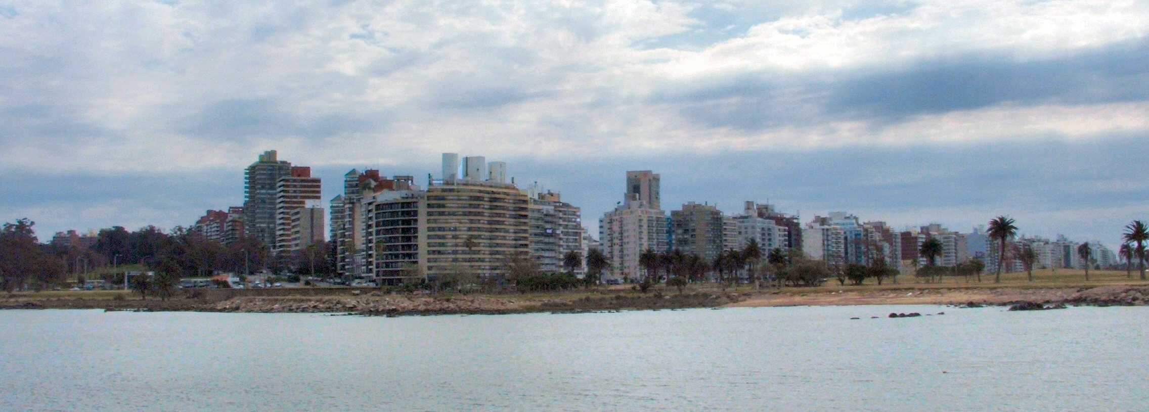 La Rambla de Punta Carretas vista desde el Faro